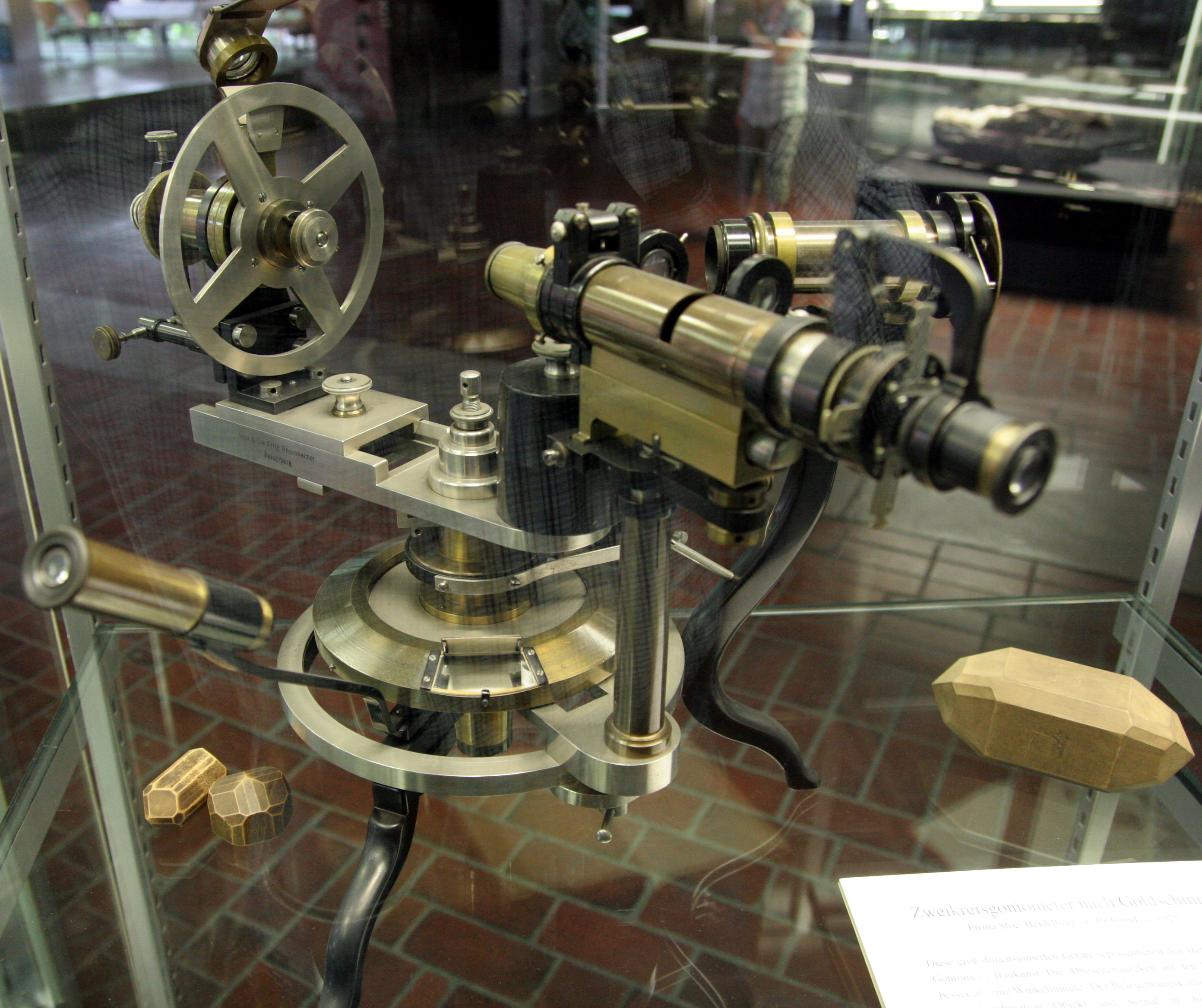 Ein Zweikreisgoniometer nach Goldschmidt (um 1925). Das Gerät befindet sich im Museum des Institutes für Geowissenschaften an der Ruprecht-Karls-Universität in Heidelberg (Im Neuenheimer Feld 234) [1]